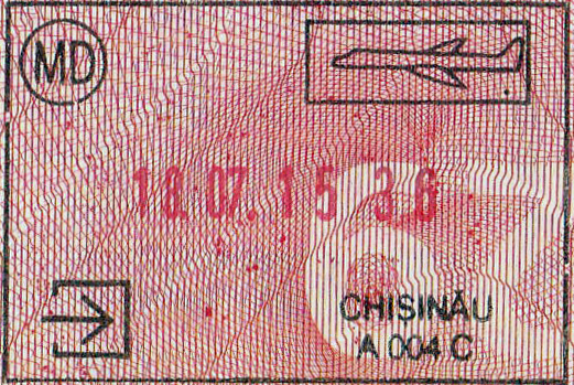 Въездной штамп, поставленный в российском паспорте в аэропорту Кишинева